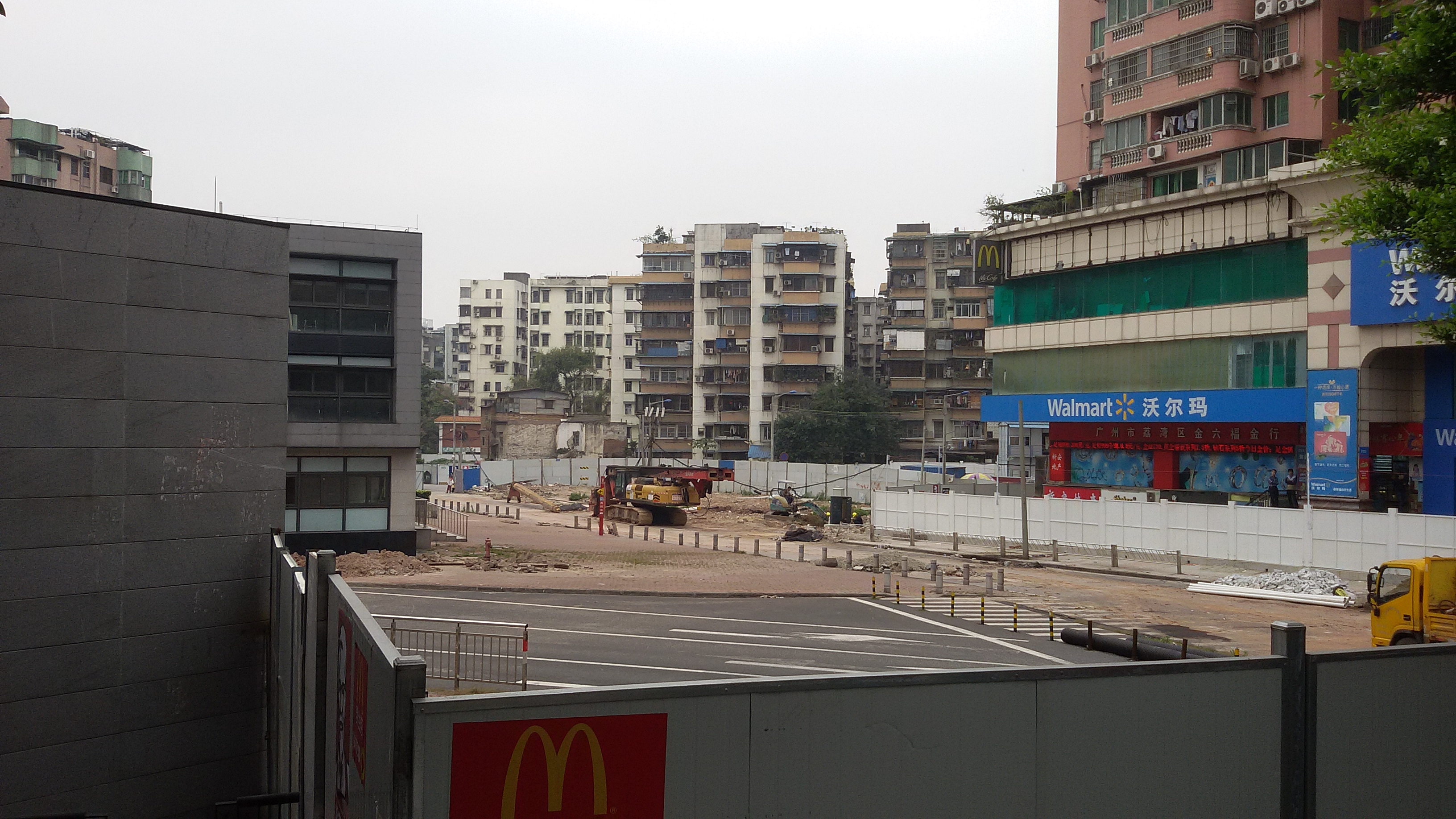 粵語: 喺西村站附近，直到2017年2月22号为止，重差呢位钉户（相中间位）因为唔满意拆迁补偿而未搬走。